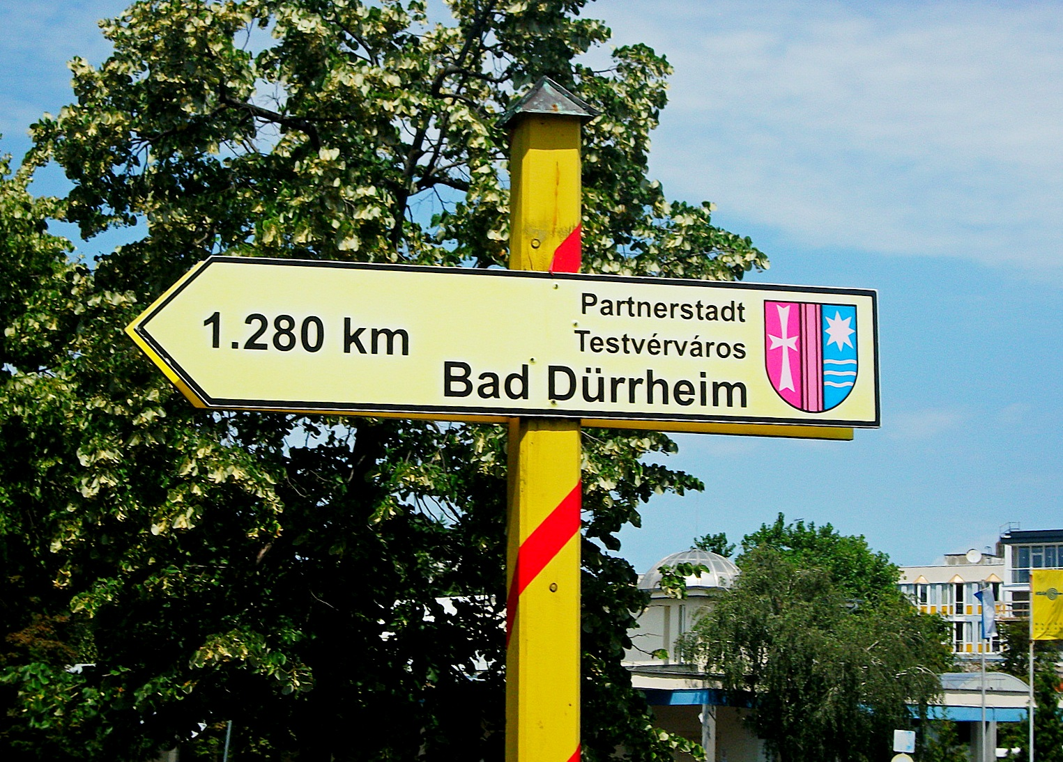 Bad Dürrheim testvérváros helységnévtáblája Hajdúszoboszlón